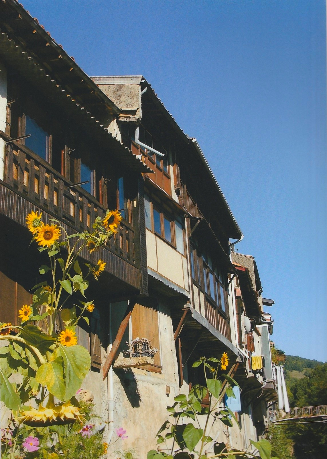 Les rives du Blau.